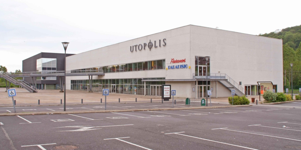 Utopolis Lonkech